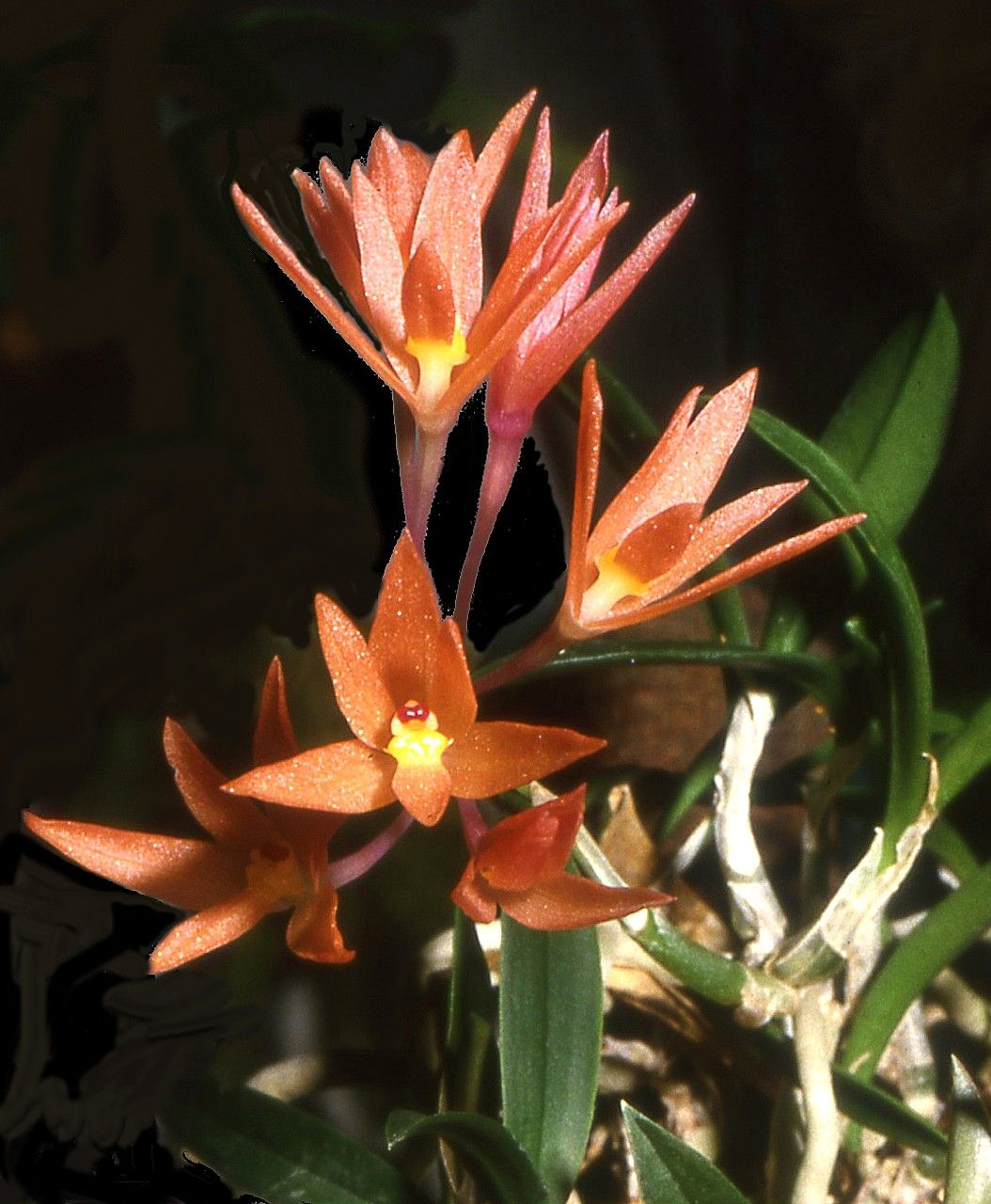 Alamania punicea - flowers